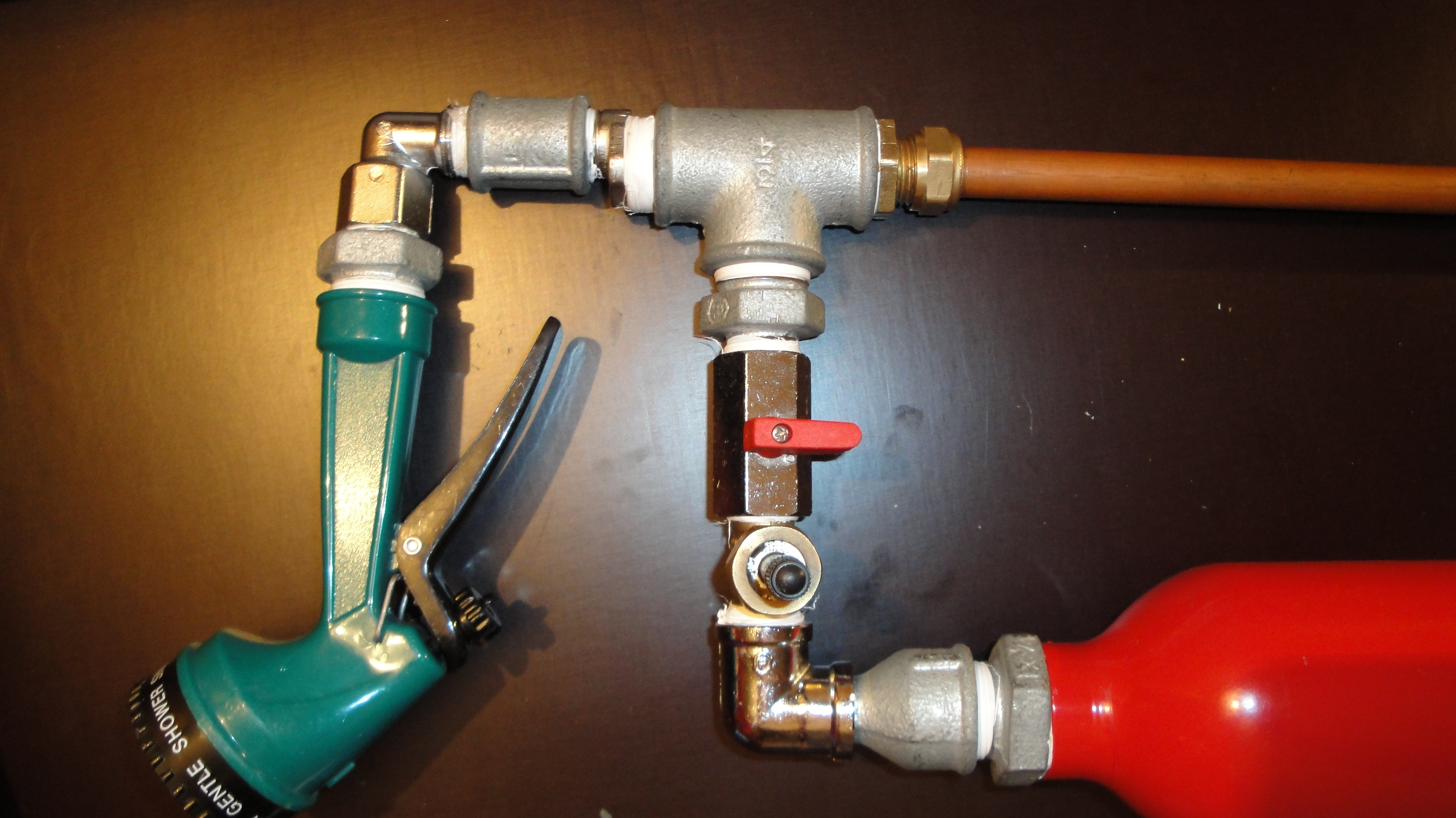 Patator à air comprimé avec qev réalisé par Masterjoa3000 pour